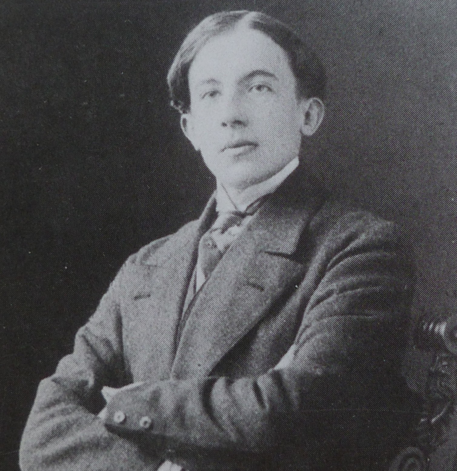 Paul-Eugène Grindel (Paul Éluard) vers 1911. Photographe inconnu.